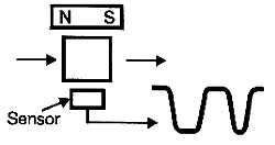 Detectando a passagem de materiais diamagnéticos.